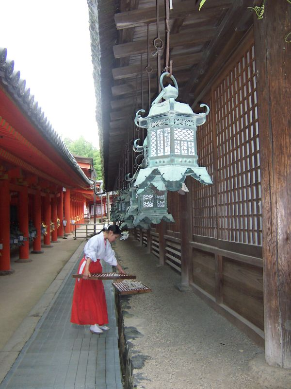 Miko (shrine maiden) working at Kassuga Taisha Shrine